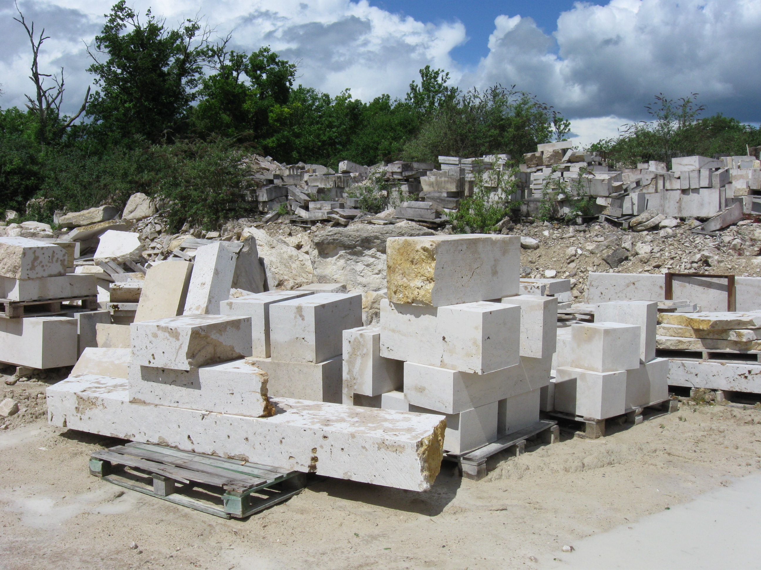 Carrière de pierre de la Grosse Roche (Souppes-sur-Loing, Seine-et-Marne, région Île-de-France).